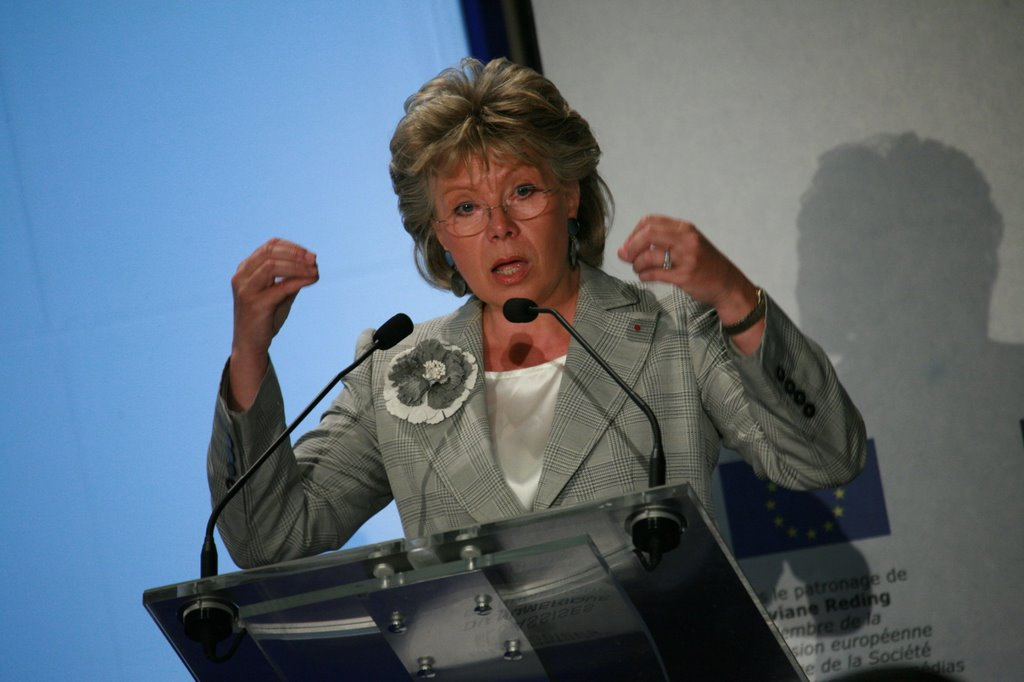 Viviane Reding aux Assises du Numérique 2008